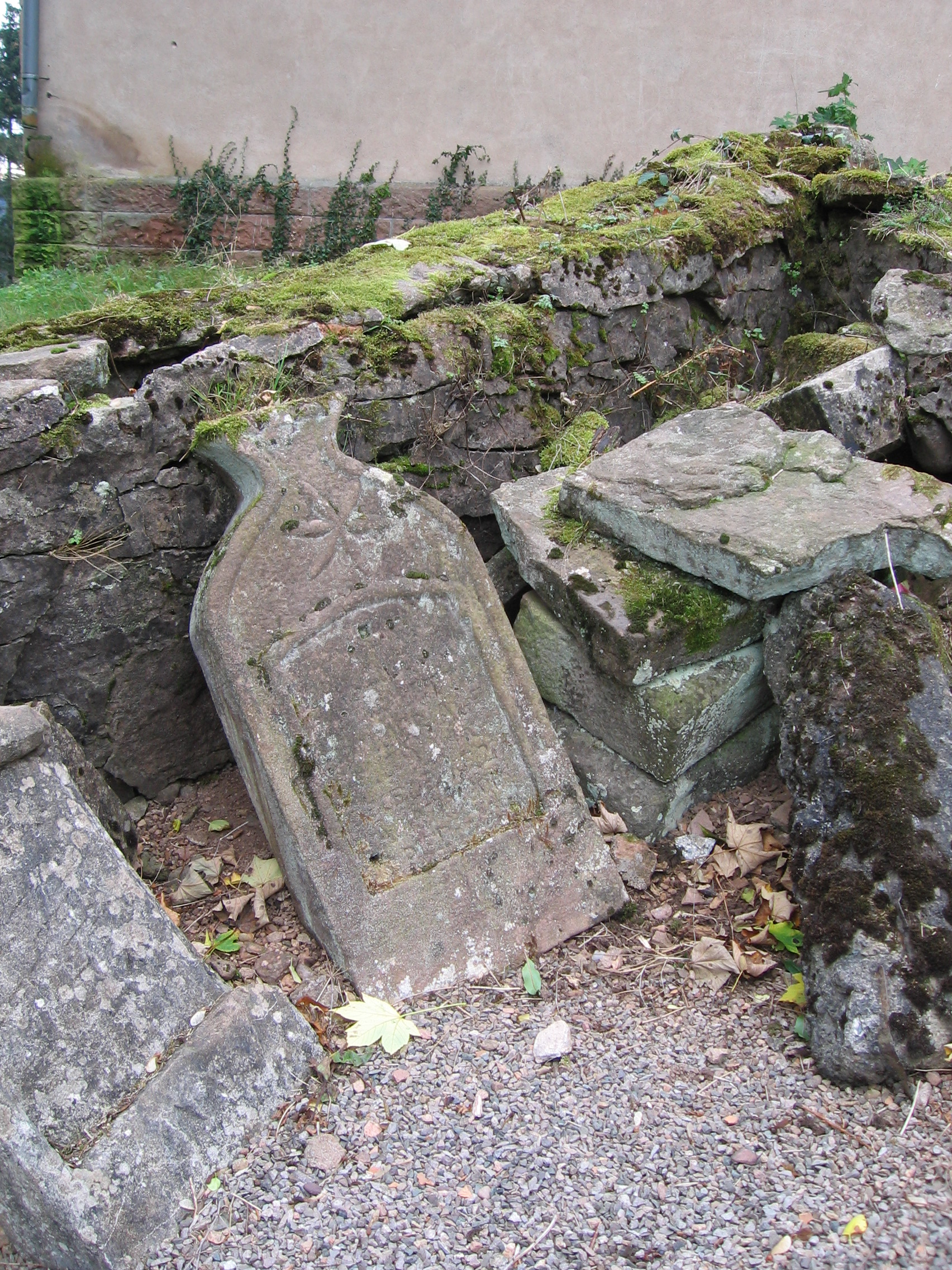 Cimetière mennonite des Quelles (La Broque, Bas-Rhin)